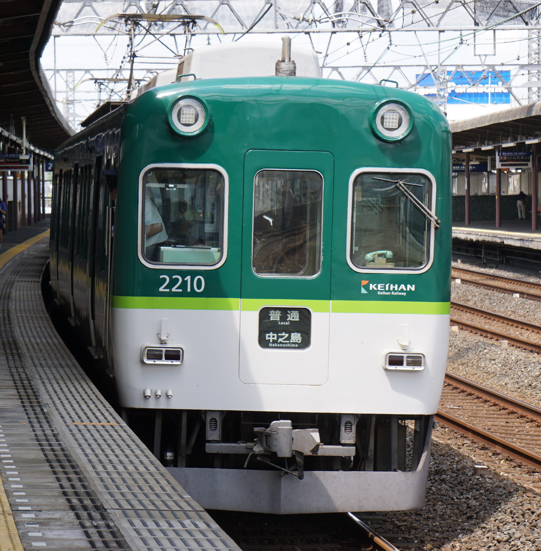 LED前照灯になった2200系